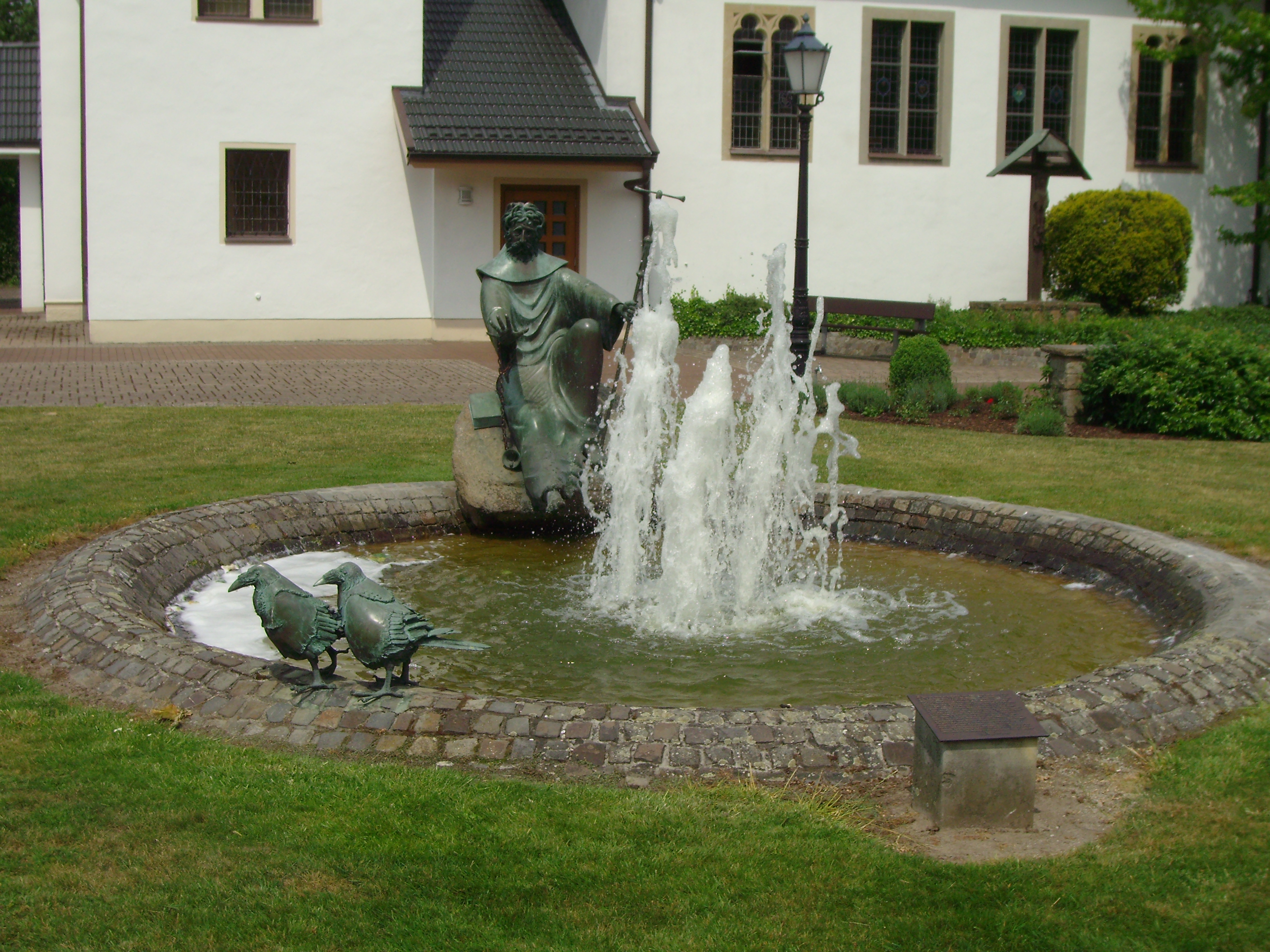 Remsede